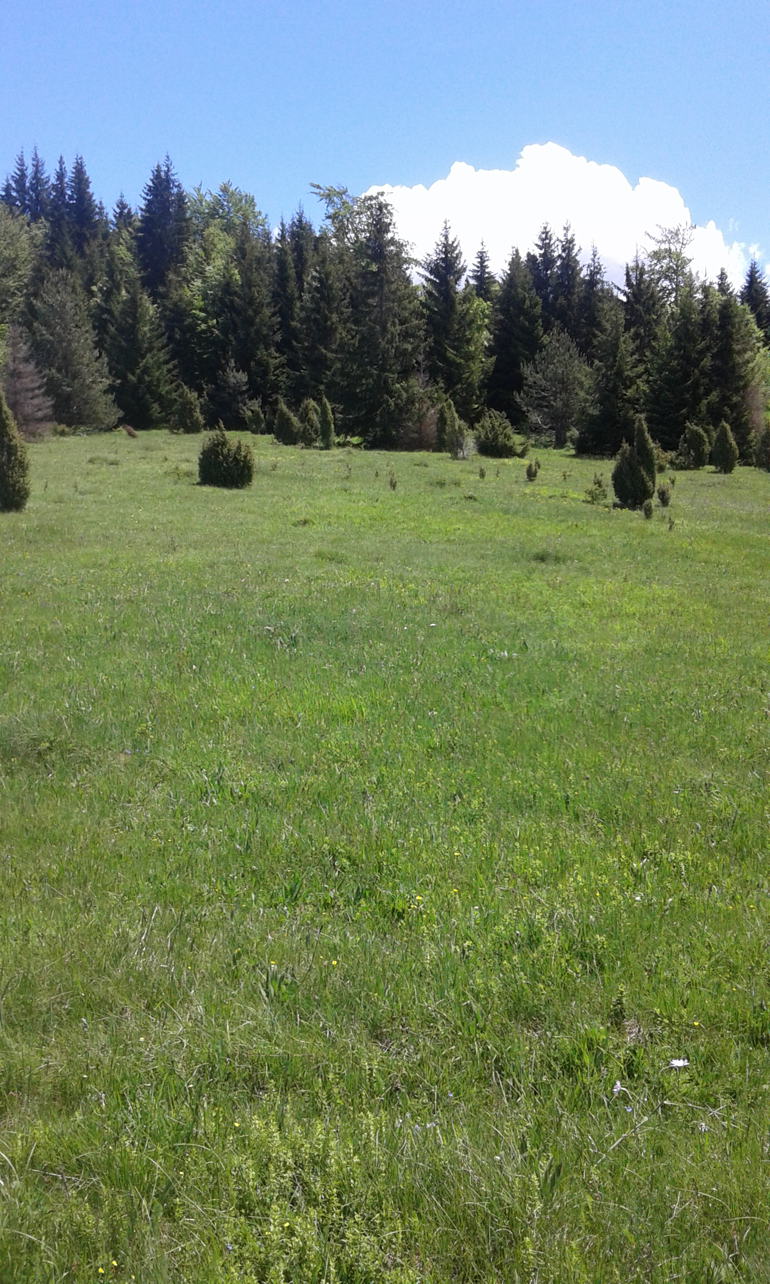 Српски (ћирилица): панорама Чемерске планине, Општина Илијаш, Кантон Сарајево, ФБиХ.